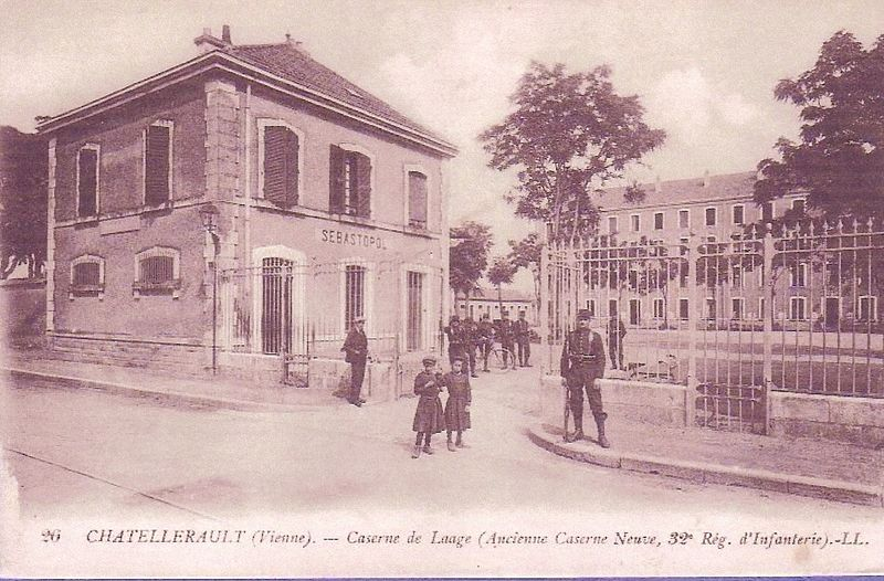 Caserne de Laage à Châtellerault, lieu de casernement d'une partie du 32° Régiment d'infanterie en 1914, le principal étant à Tours